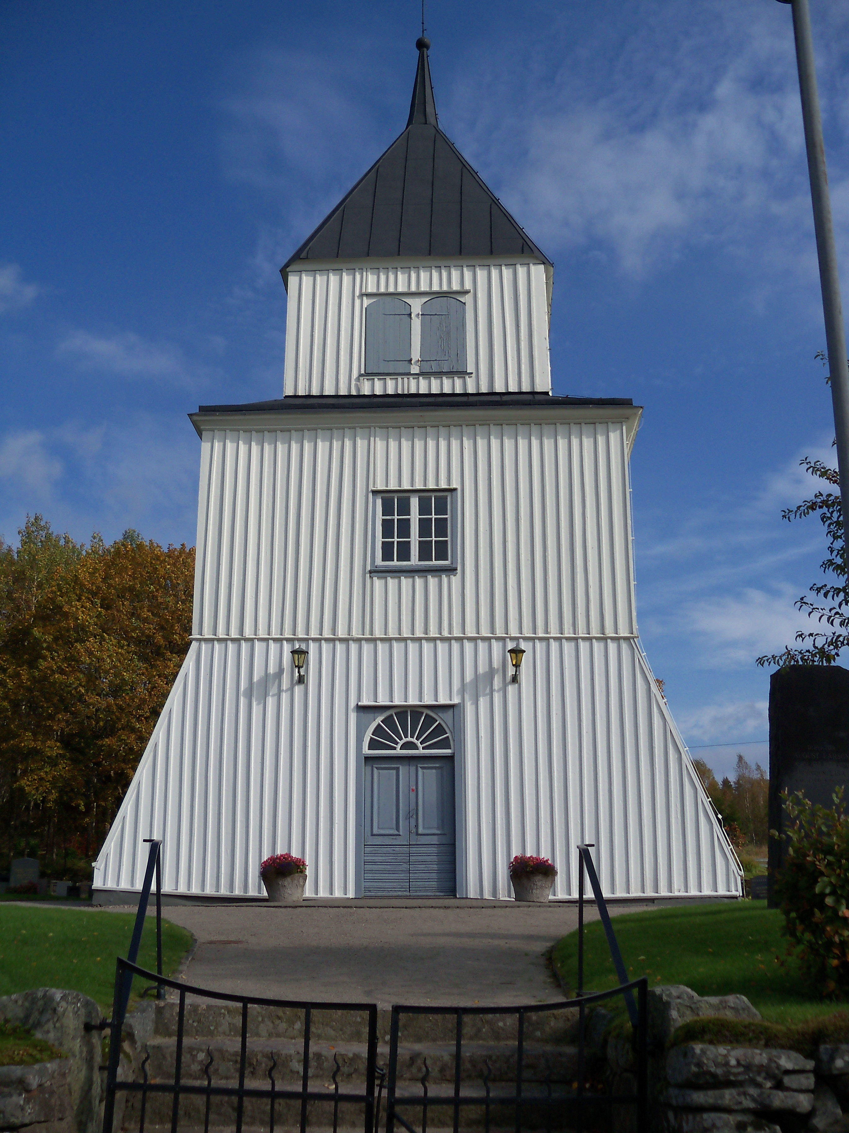 Grönahögs kyrka